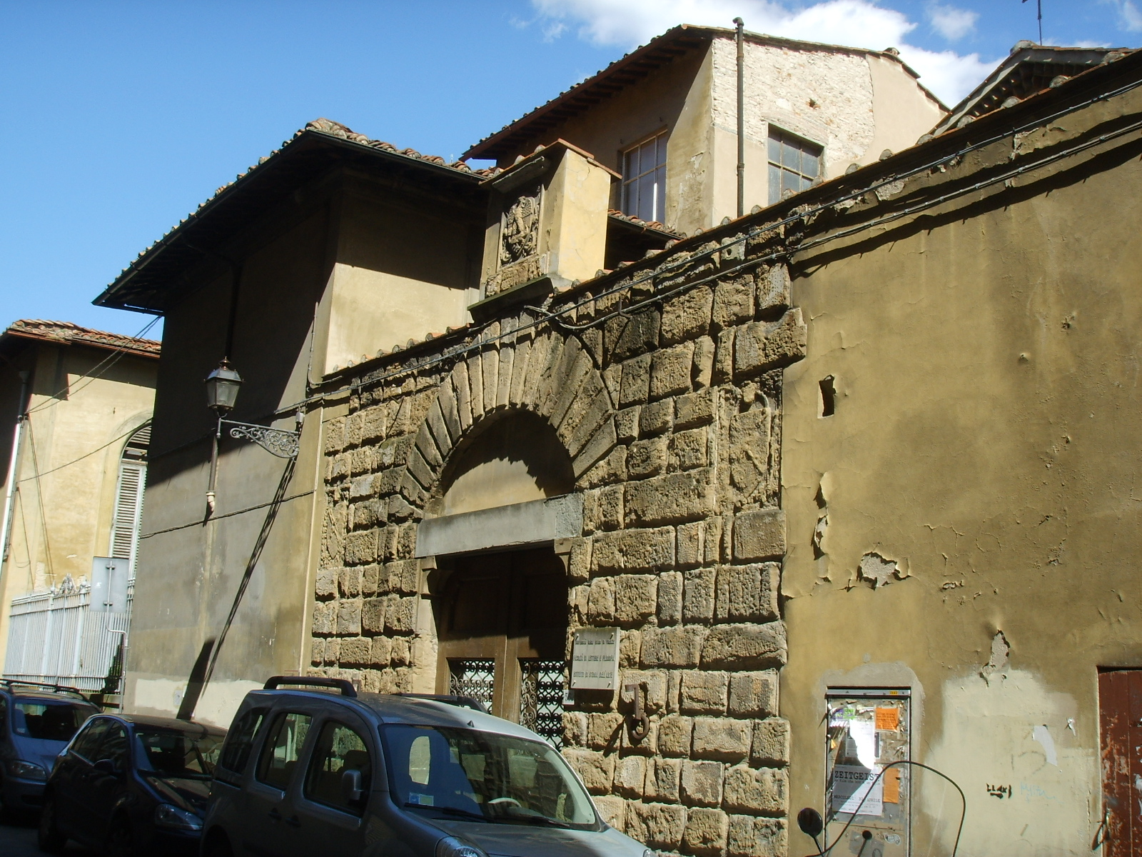 Ospizio di Orbatello